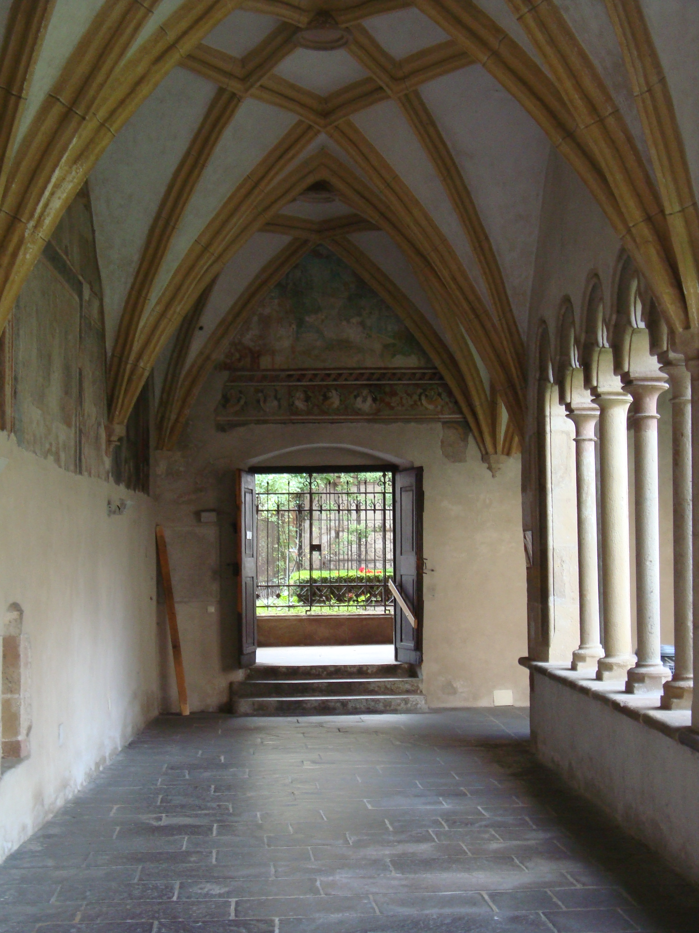 San francesco, bolzano, chiostro